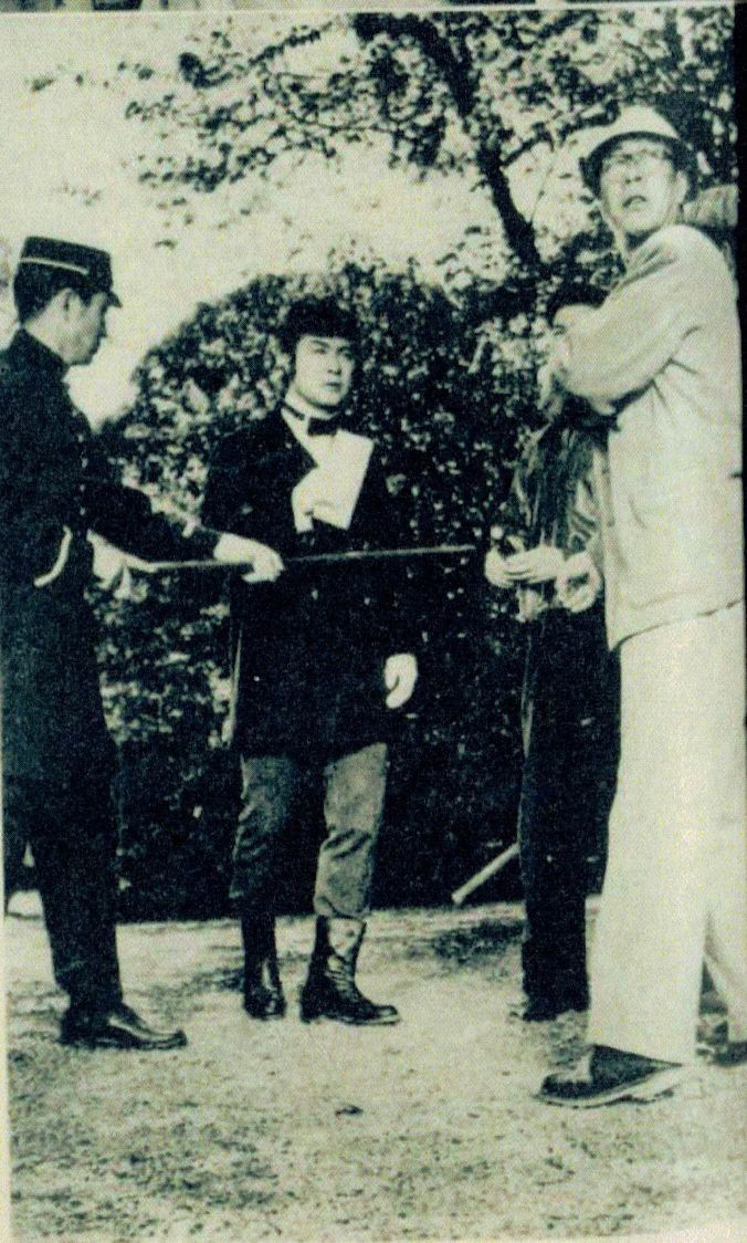 キネマ旬報社『キネマ旬報』第178号(1957)より映画『霧の街』撮影シーン。中央が主演の東千代之介。右が監督の佐々木康。